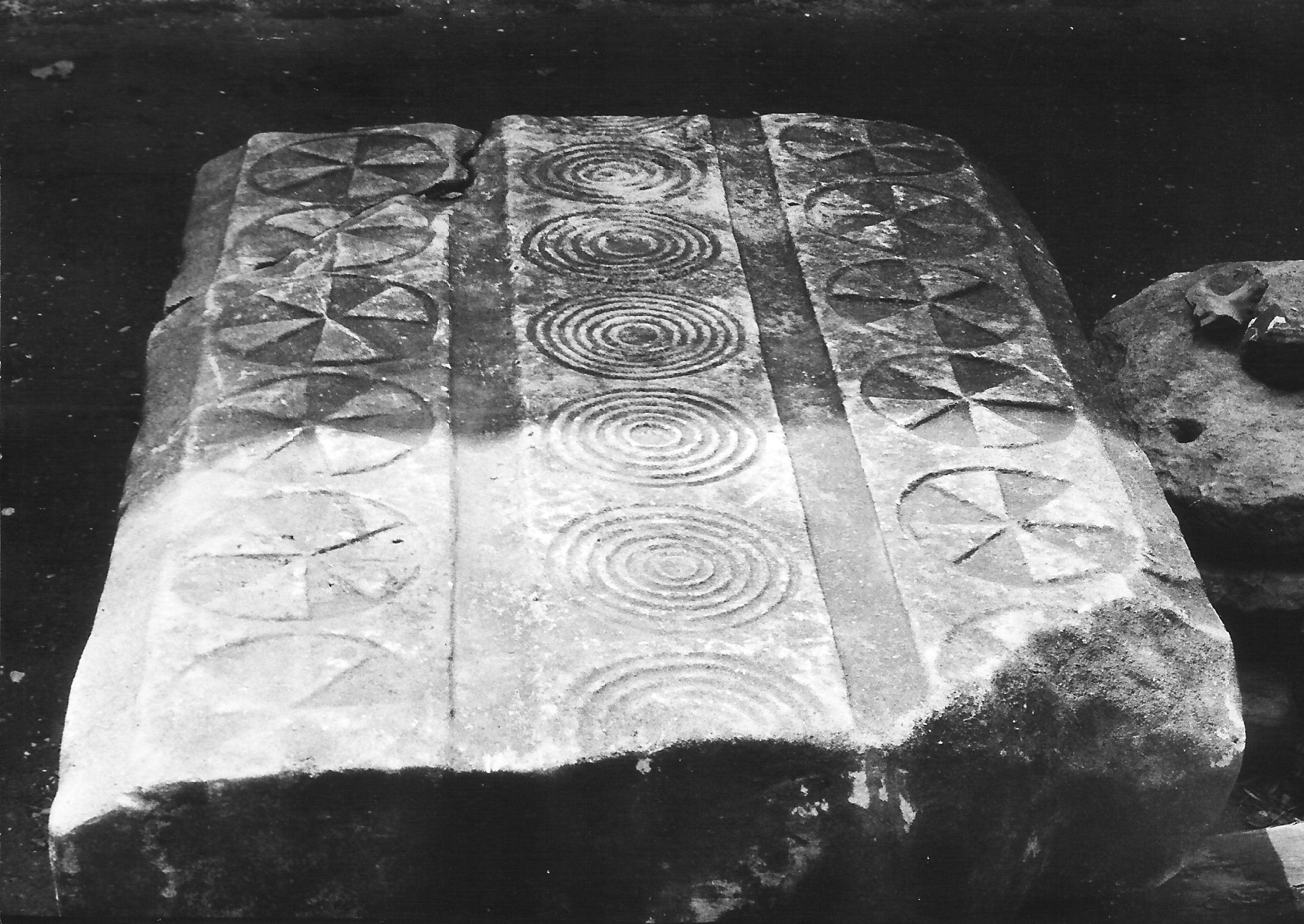 Резная известняковая плита из кургана под Новосвободной, Адыгея.